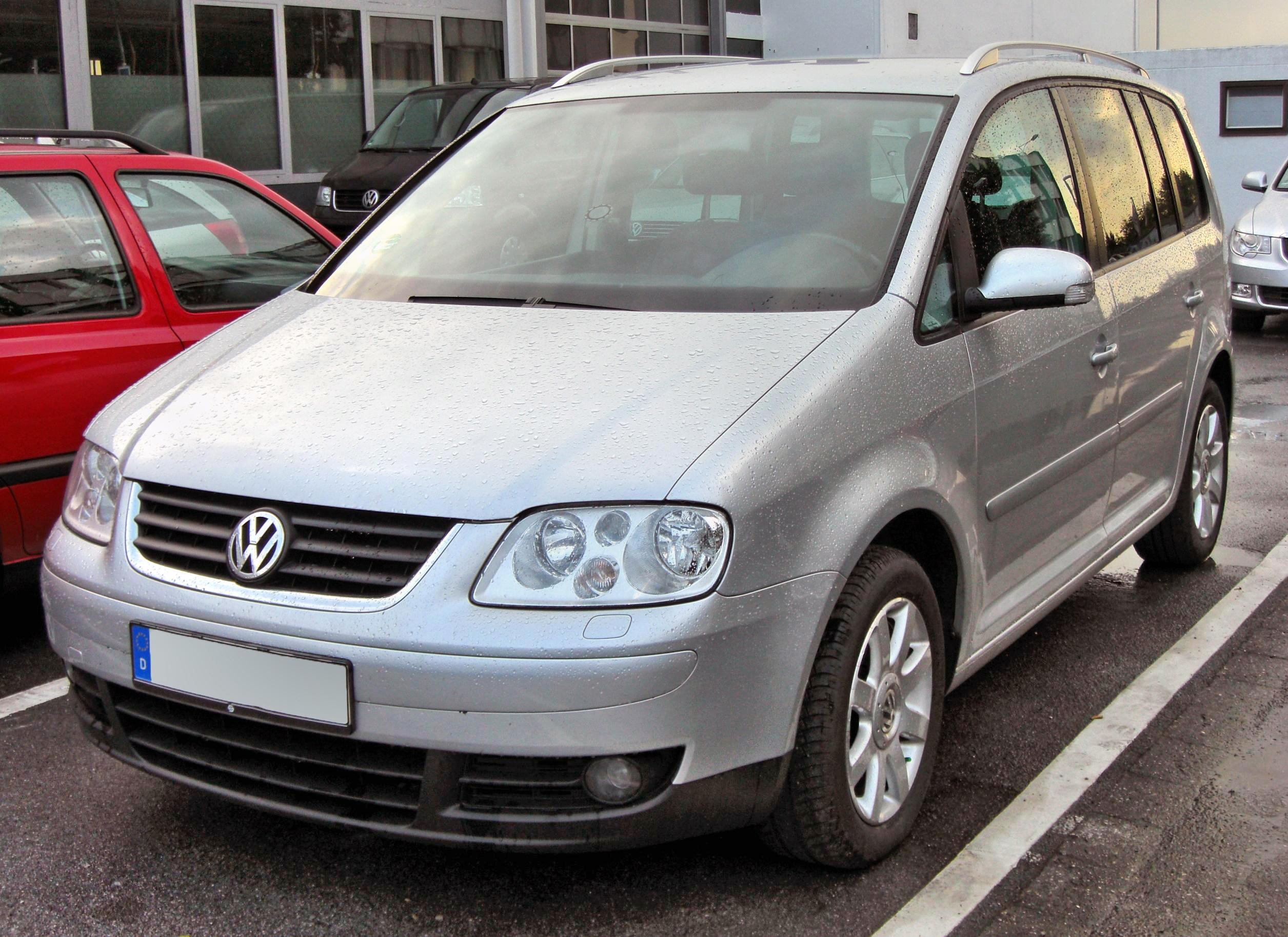 VW Touran